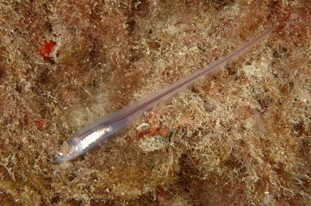 Karap europejski (Carapus acus)